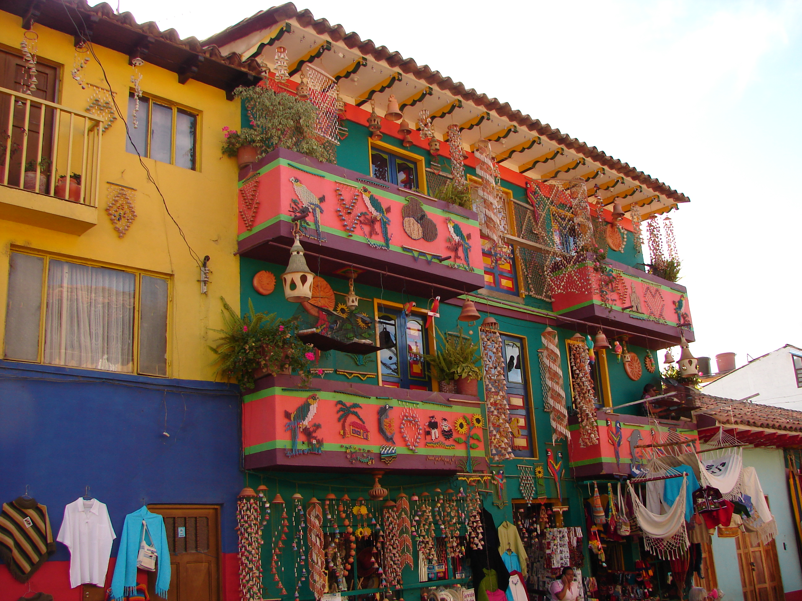 comercio tradicional de artesanías, Ráquira, Boyacá